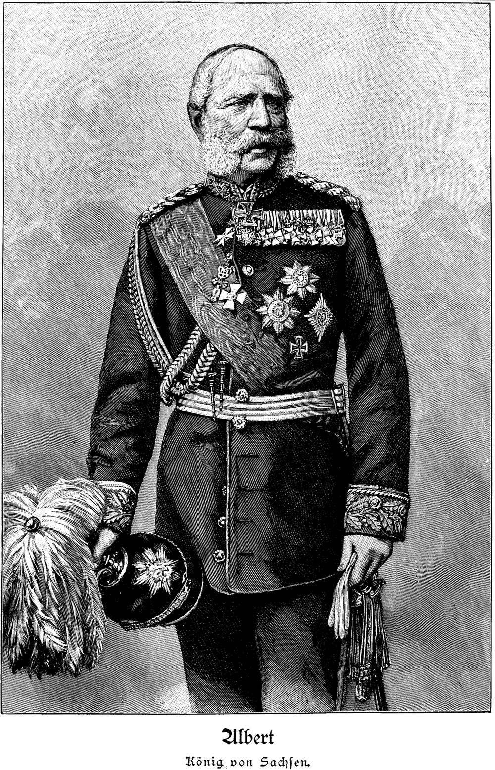 Holzschnitt um 1880